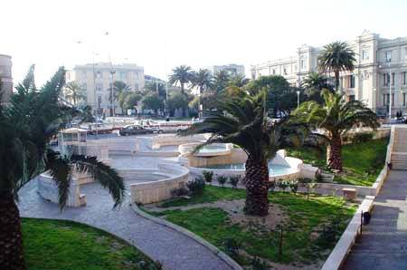 foto scattata da cellulare.